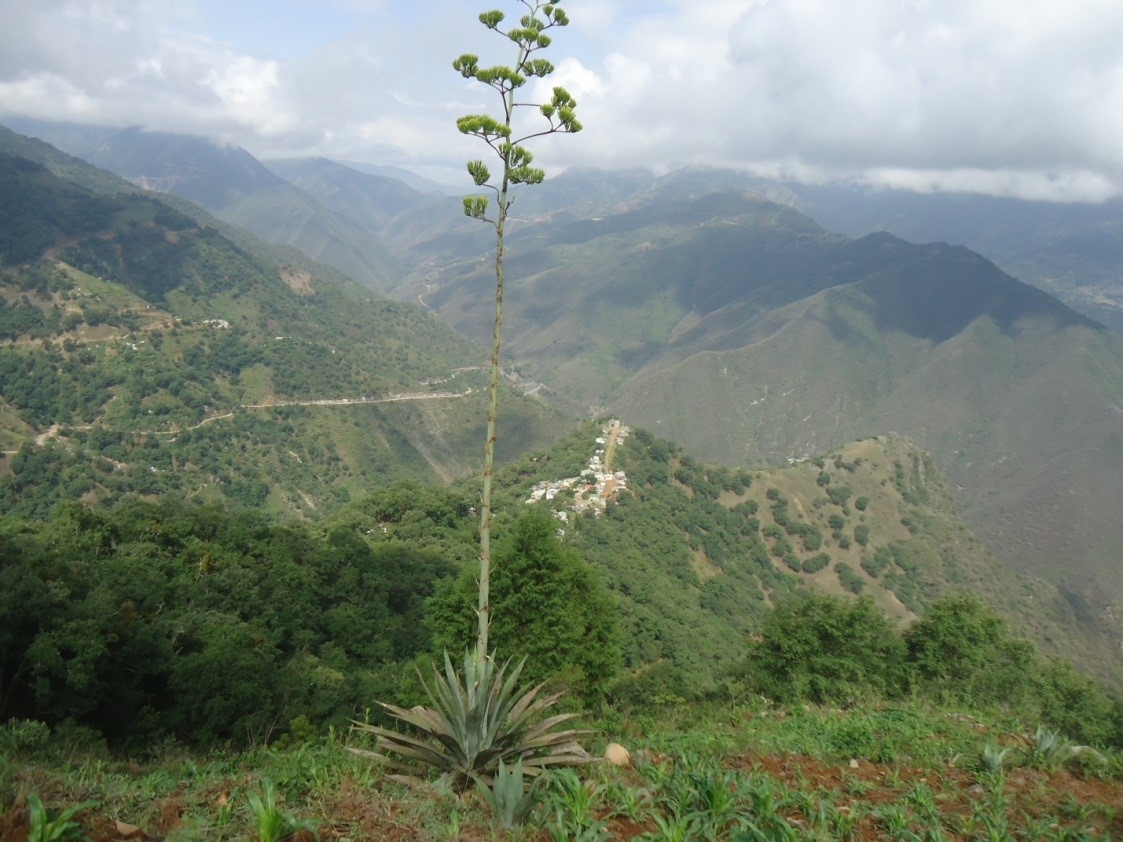 Vista panorámica del paisaje de la Ciénega